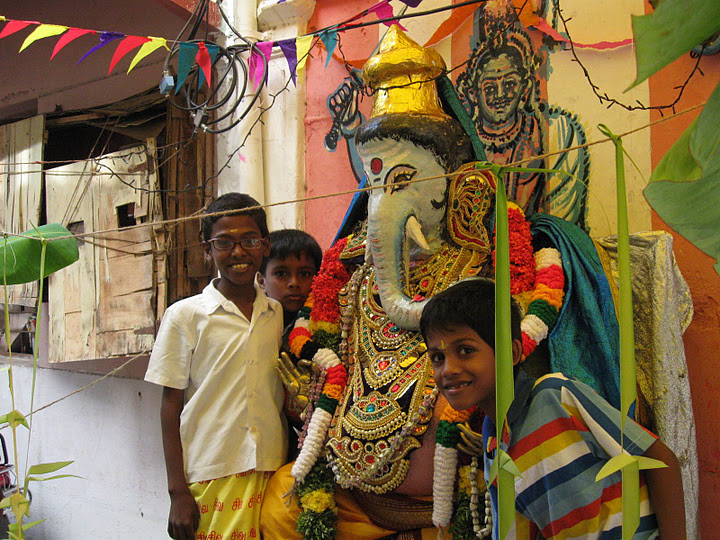 சங்கத் தமிழ் மூன்றும் வேண்டி ஔவையார் தொழுத விநாயகருக்குத் தமிழ்நாட்டில் சதுர்த்தித் திருவிழா வெகு விமரிசையாகக் கொண்டாடப்படுவது வழக்கம். அப்படியானதொரு சதுர்த்தி விழாவில் குழந்தைகளோடு விநாயகர் அருள்பாலிக்கும் படம்.